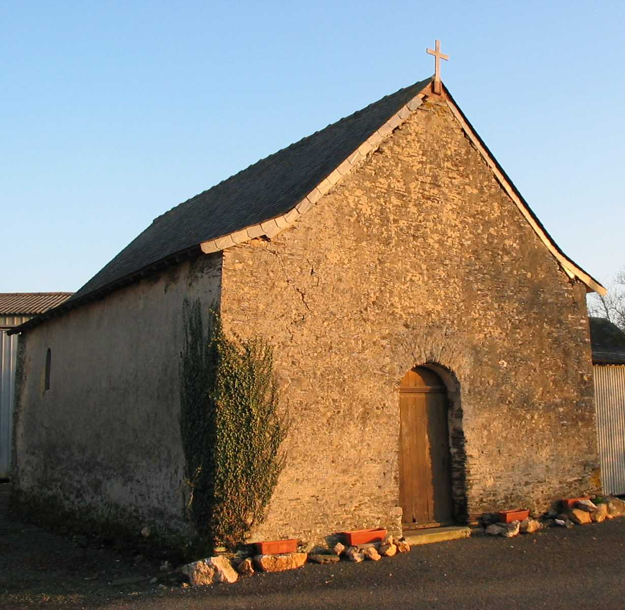 Description La chapelle St Barthélémy à la Pouëze (49) Date21 December 2006Sourcefr:Utilisateur:Poussin jean photographie personnelleAuthorfr:Utilisateur:Poussin jean La chapelle St Barthélémy à la Pouëze (49)